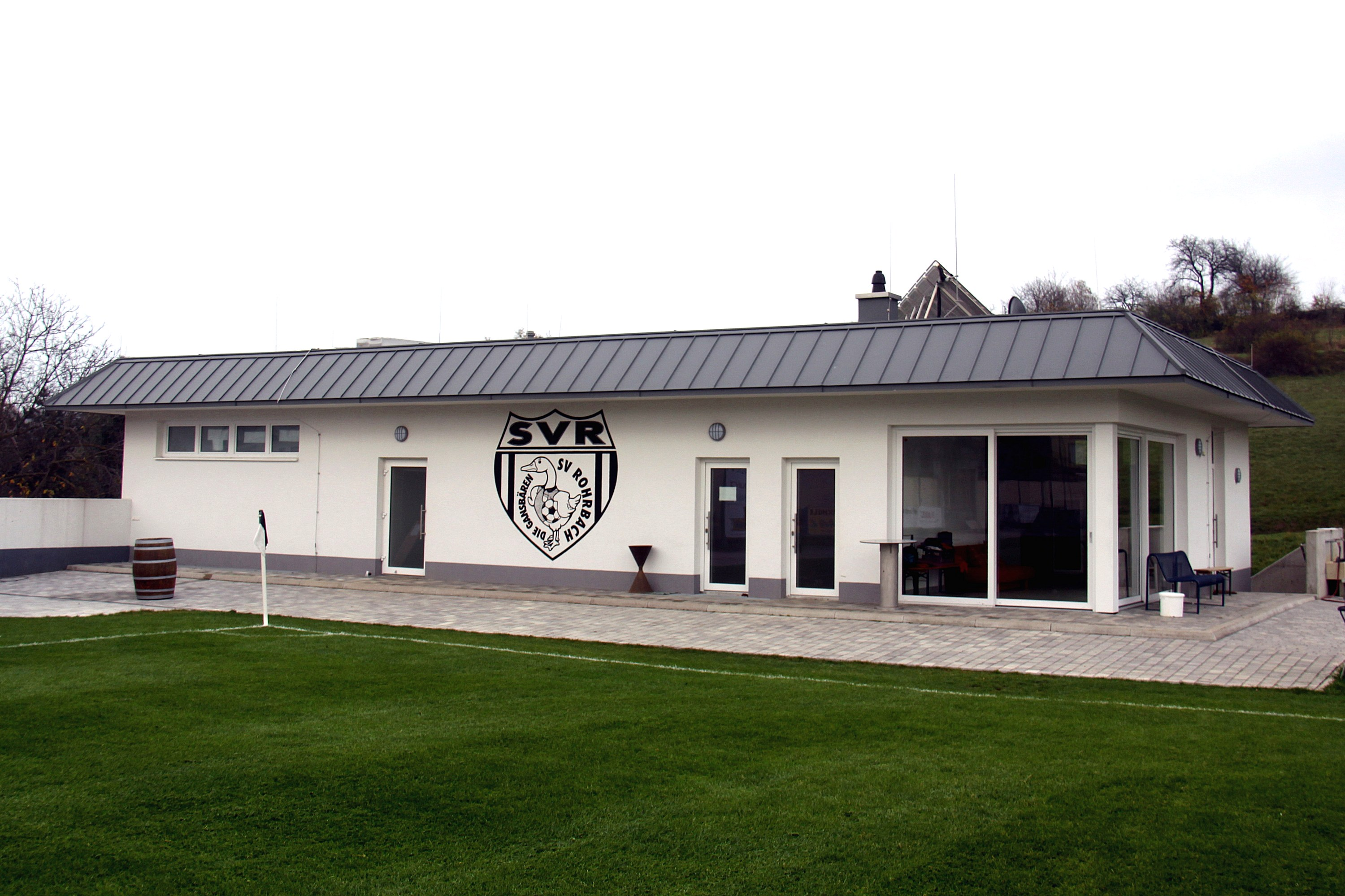 Gansbärenstadion des SV Rohrbach, Kabinen und Klubhaus.